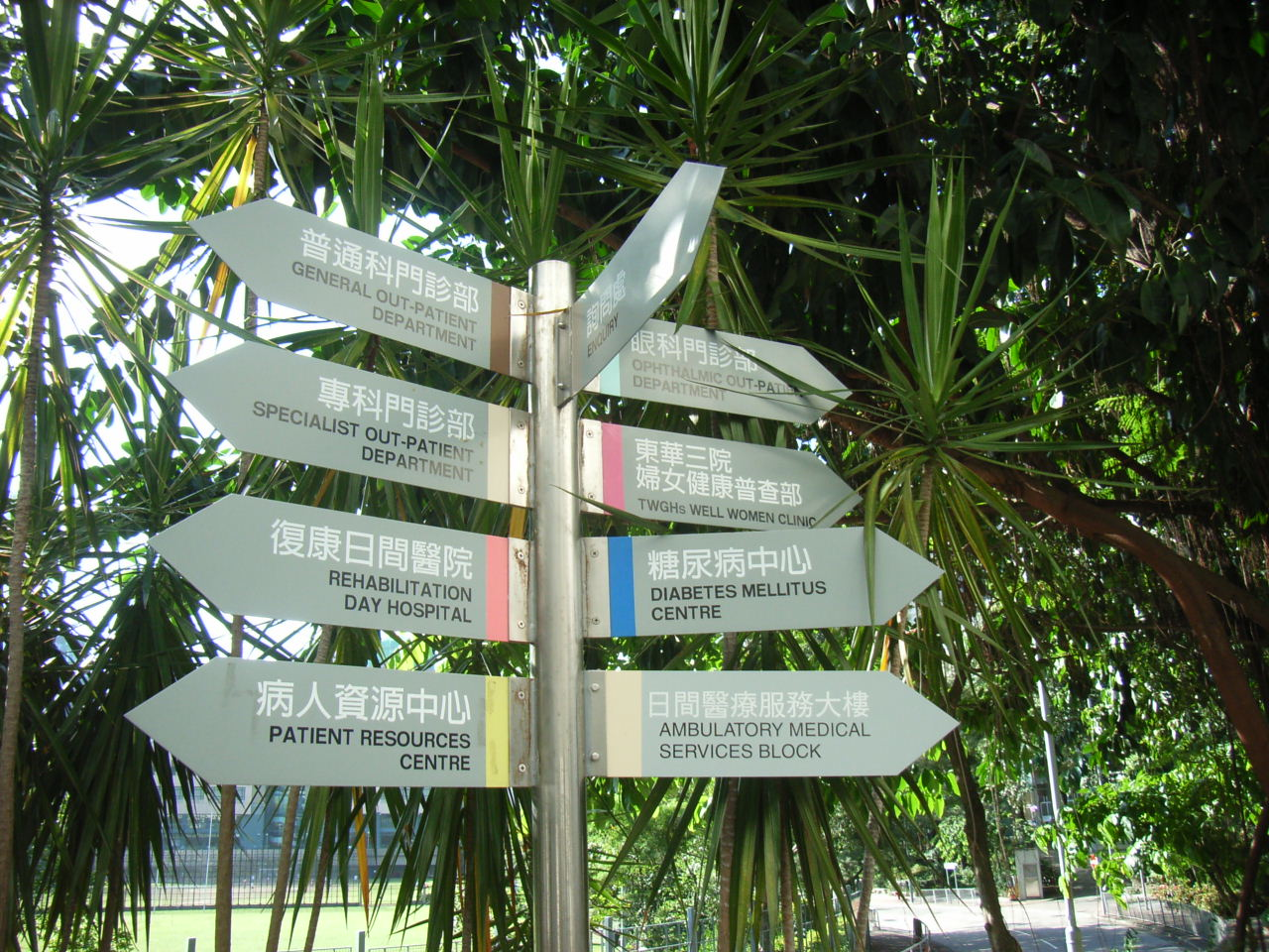 東華東院位於銅鑼灣掃桿埔東院道19號 Author: BEVERLYSHEN